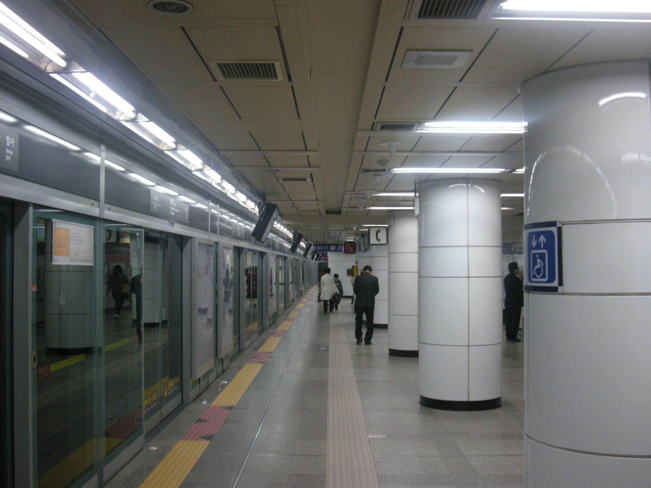 서울 지하철 8호선 천호역 암사 방면 승강장